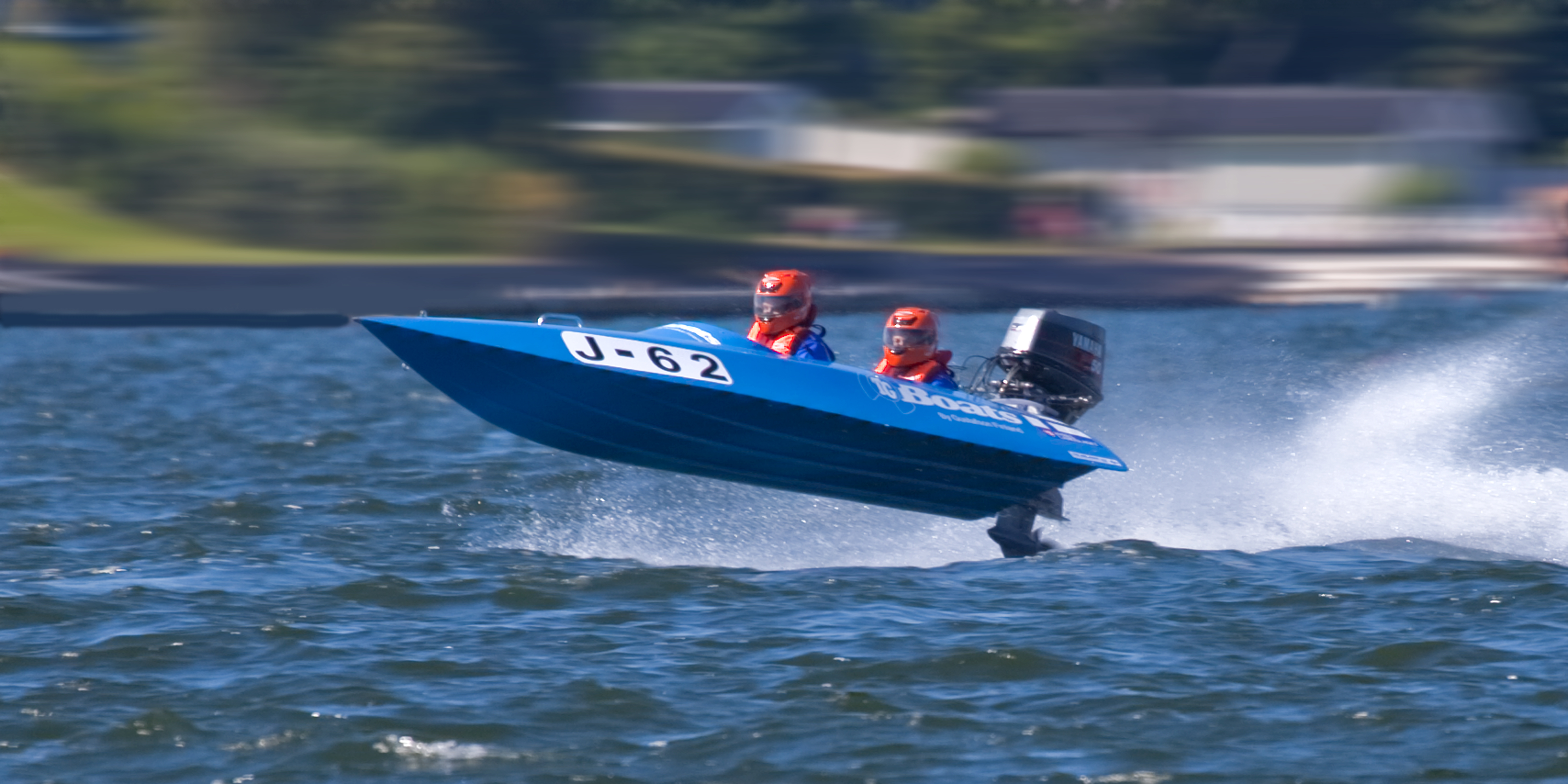 Roslagsloppet 2012